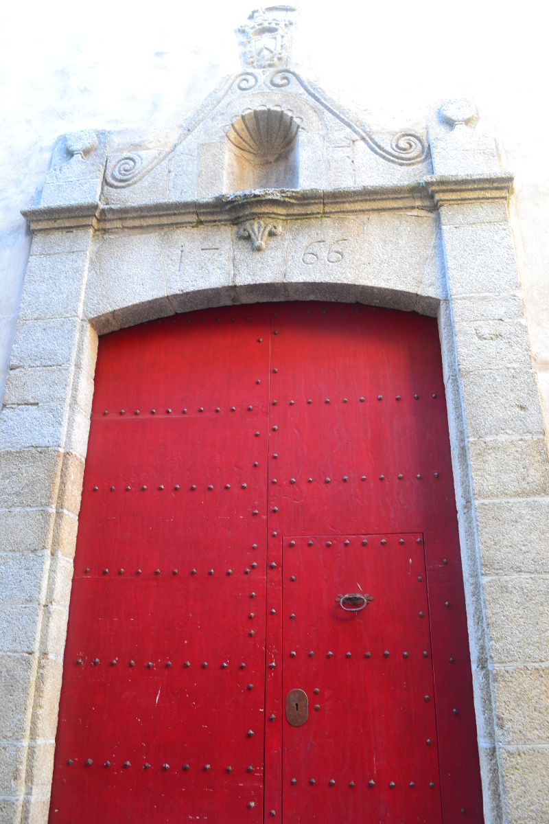 Entrée de l'Eglise des Carmes. Edifice religieux de 1766.